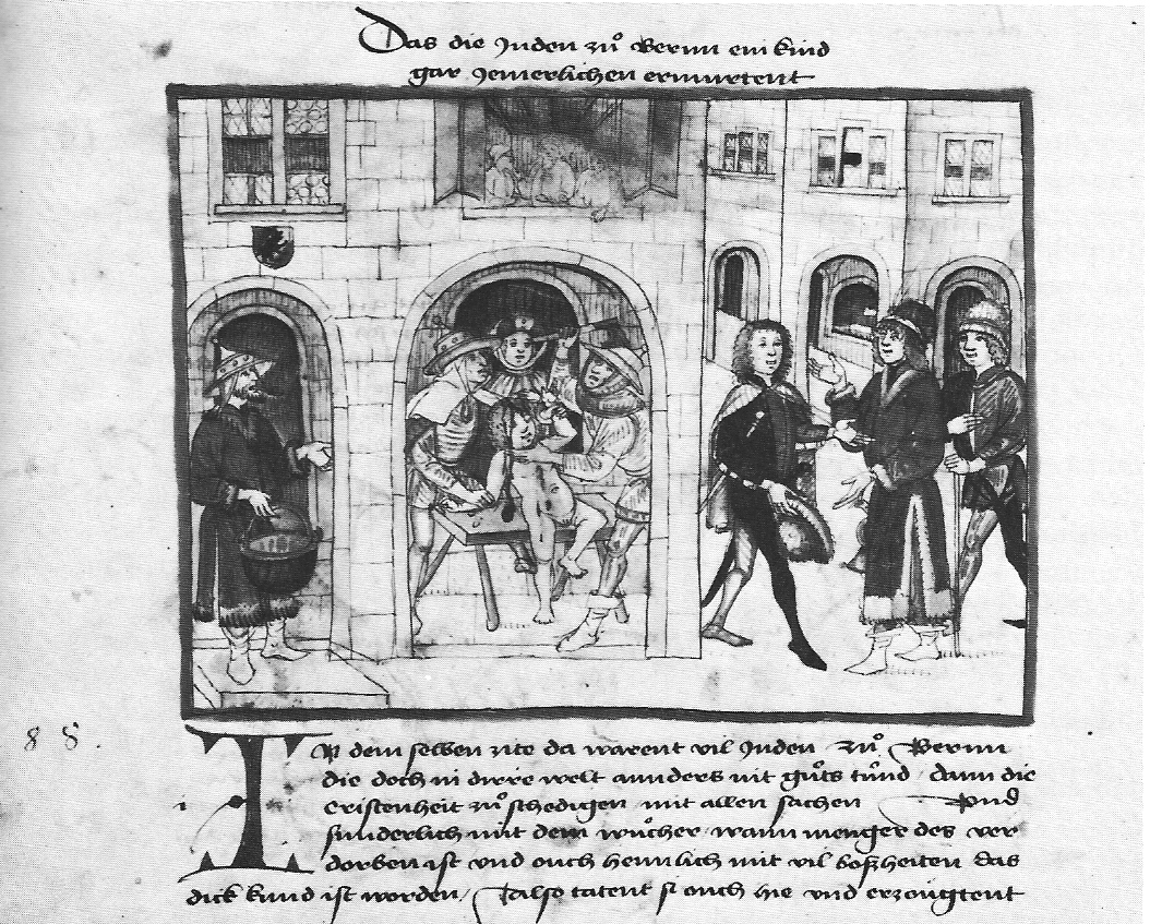 Darstellung der Geschichte Rudolf von Berns in der Berner Chronik von Diebold Schilling dem Älteren (Burgerbibliothek Bern, Mss. h. h. I, 1)